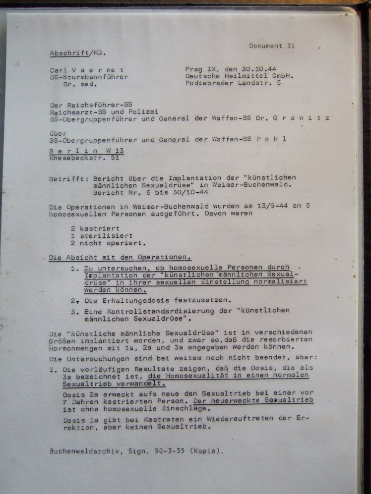 Vaernets Bericht über die Implantation der "künstlichen männlichen Sexualdrüse" in KZ Buchenwald (Prag, 1944)